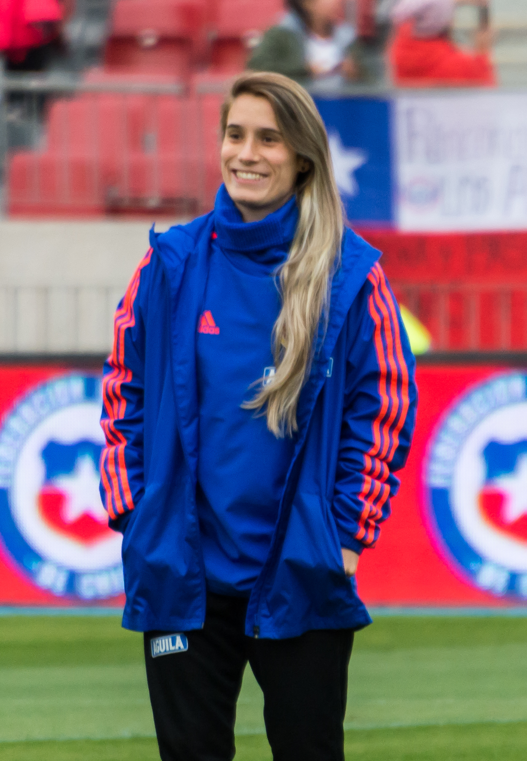 Daniela Montoya, Chile v Colombia, Estadio Nacional, Ñuñoa, Santiago, Chile.